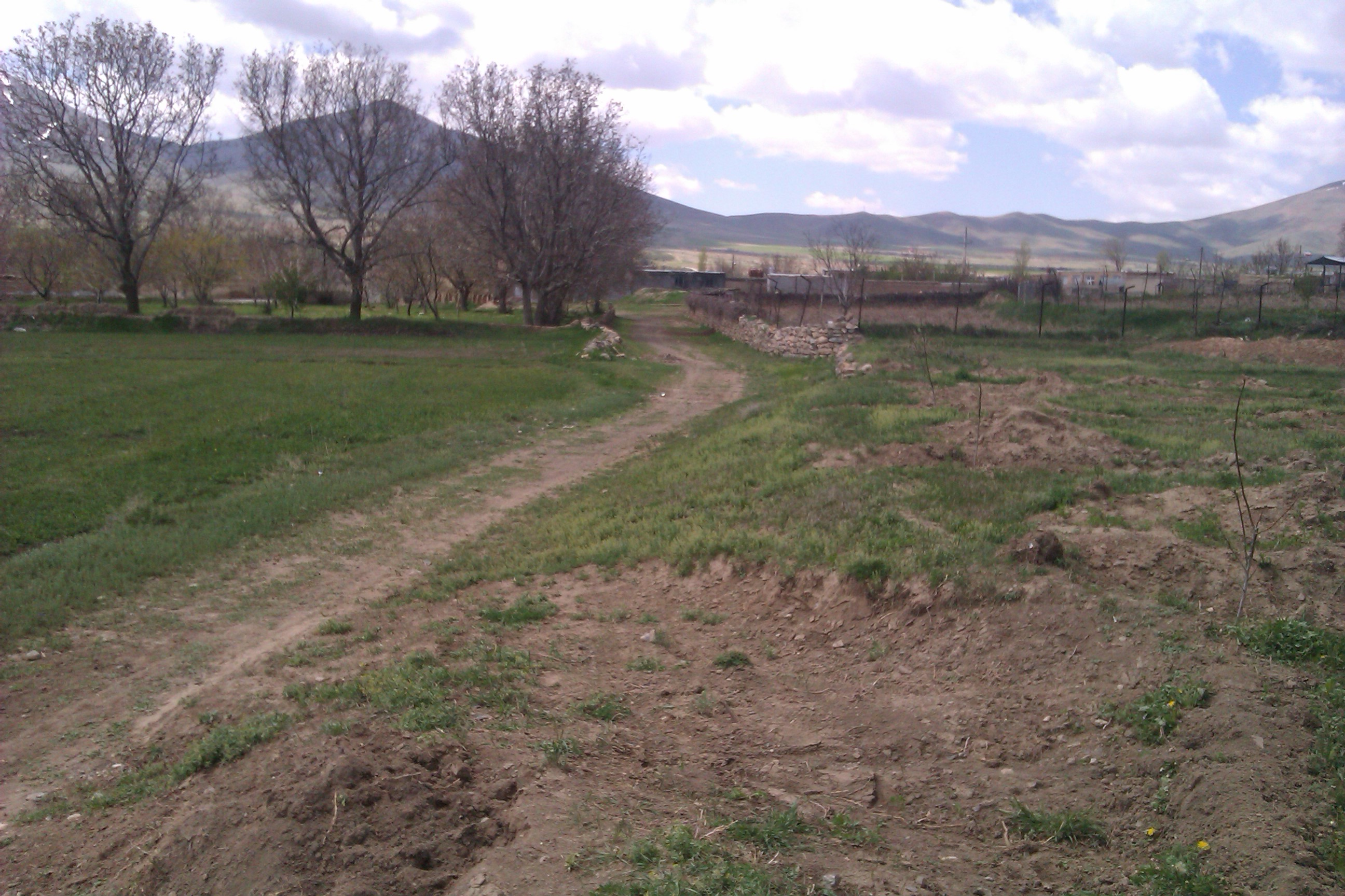 روستای ییلاقی فرج آباد